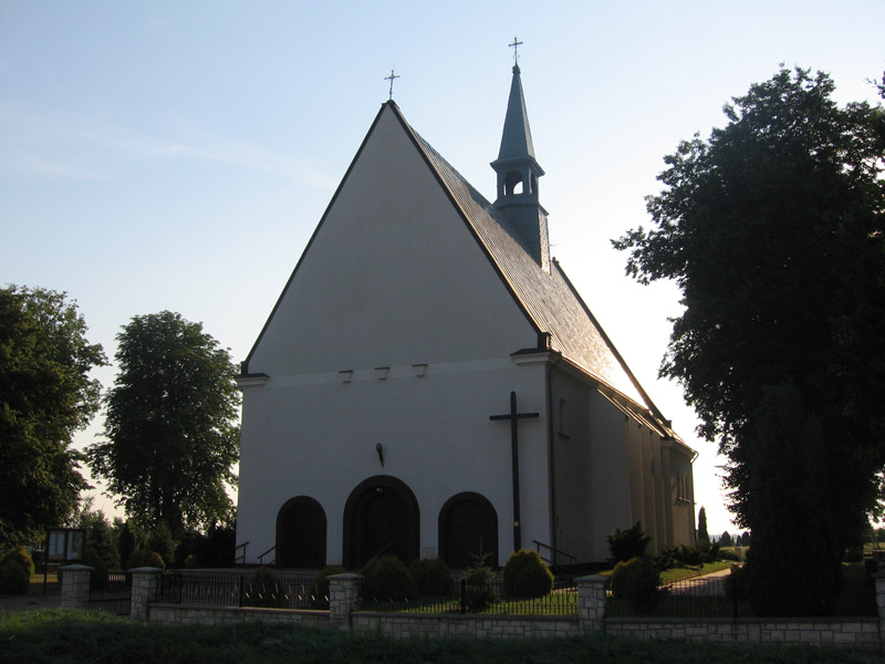 Kościół w Górkach (gmina Borowa, powiat mielecki)